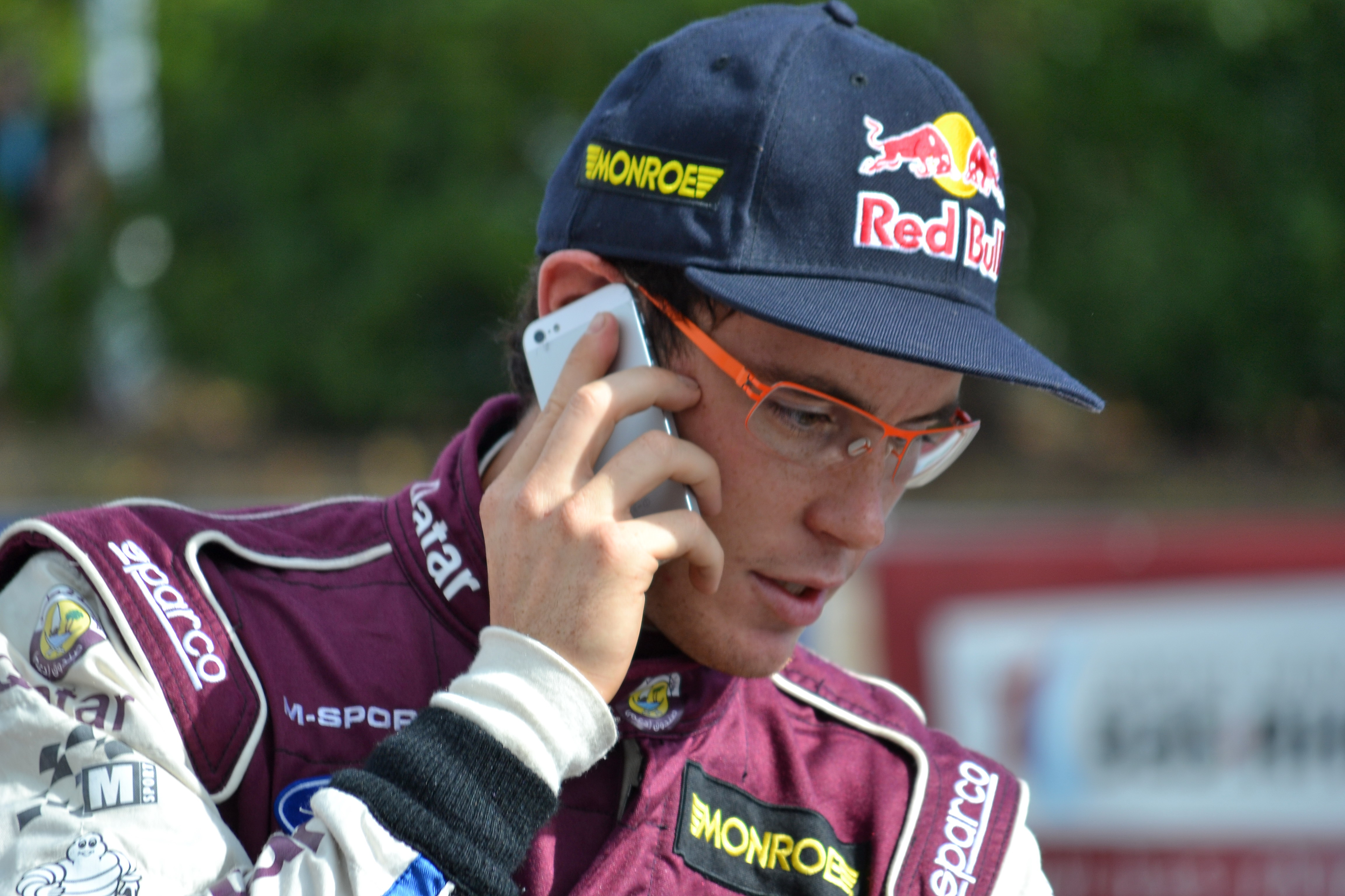 Thierry Neuville au parc d'assistance de Colmar durant le Rallye de France-Alsace 2013.